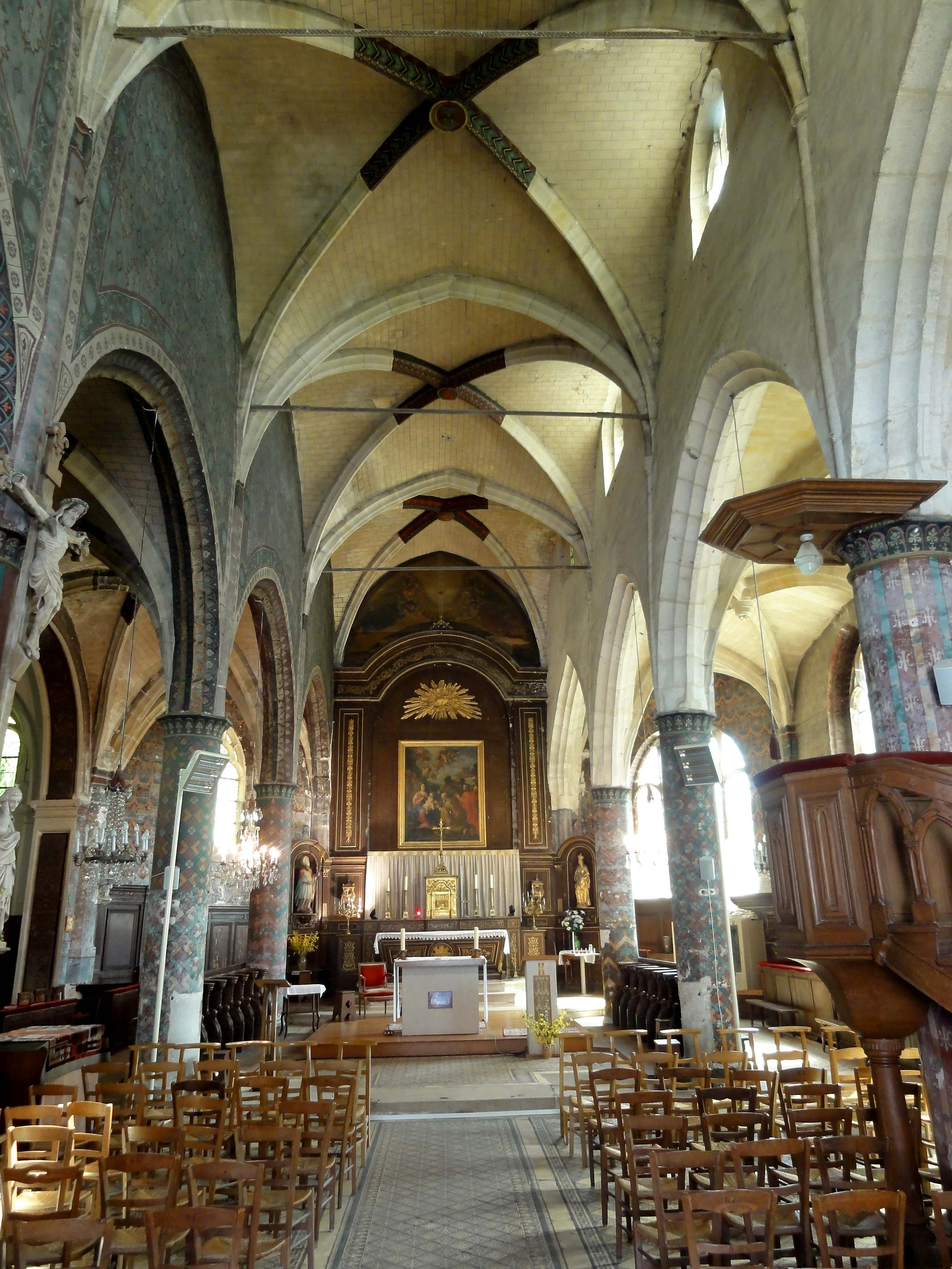 Intérieur de l'église (voir titre).